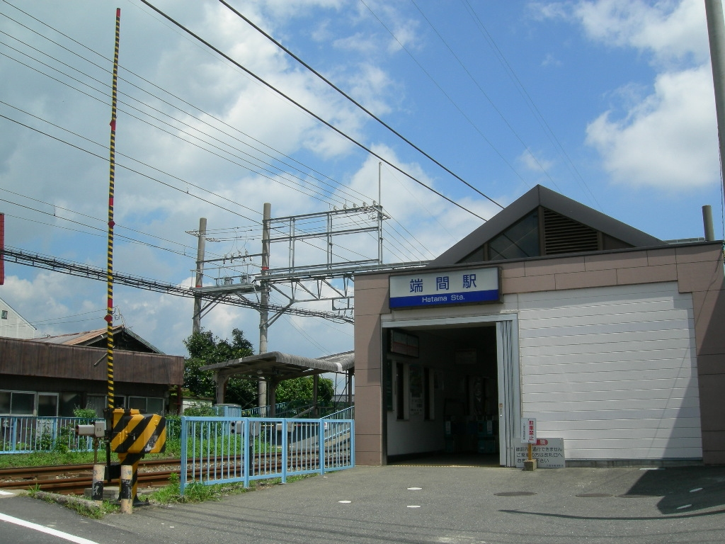 端間駅（2006年7月自身撮影）